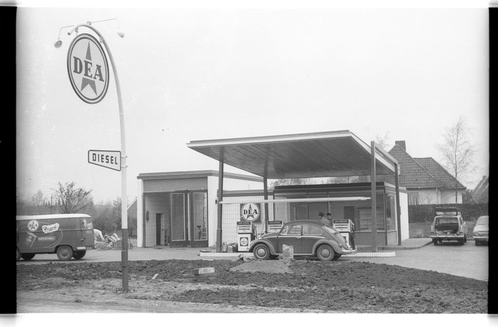 Eröffnung.